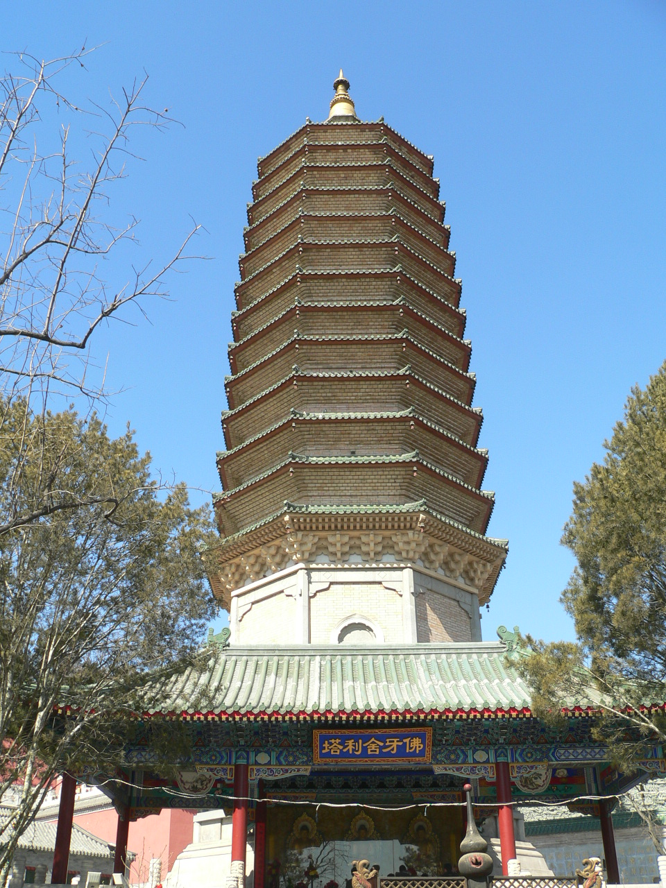 灵光寺塔 拍摄